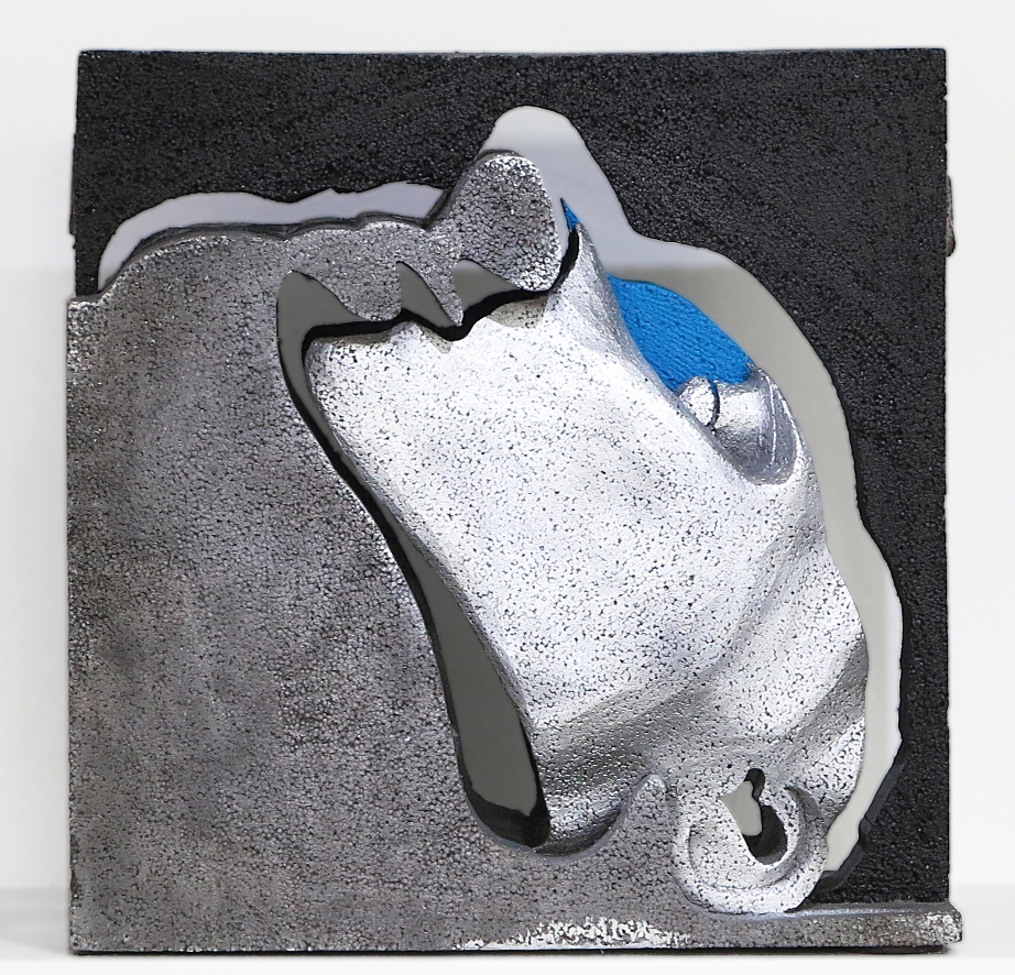 Layersculpture Kopf aus dem Zyklus "Abschied von einem Unbekannten". Teilpolierte/teilbemalte Aluminiumguss-Skulptur von Gerhard Roese, 2013, Privatbesitz